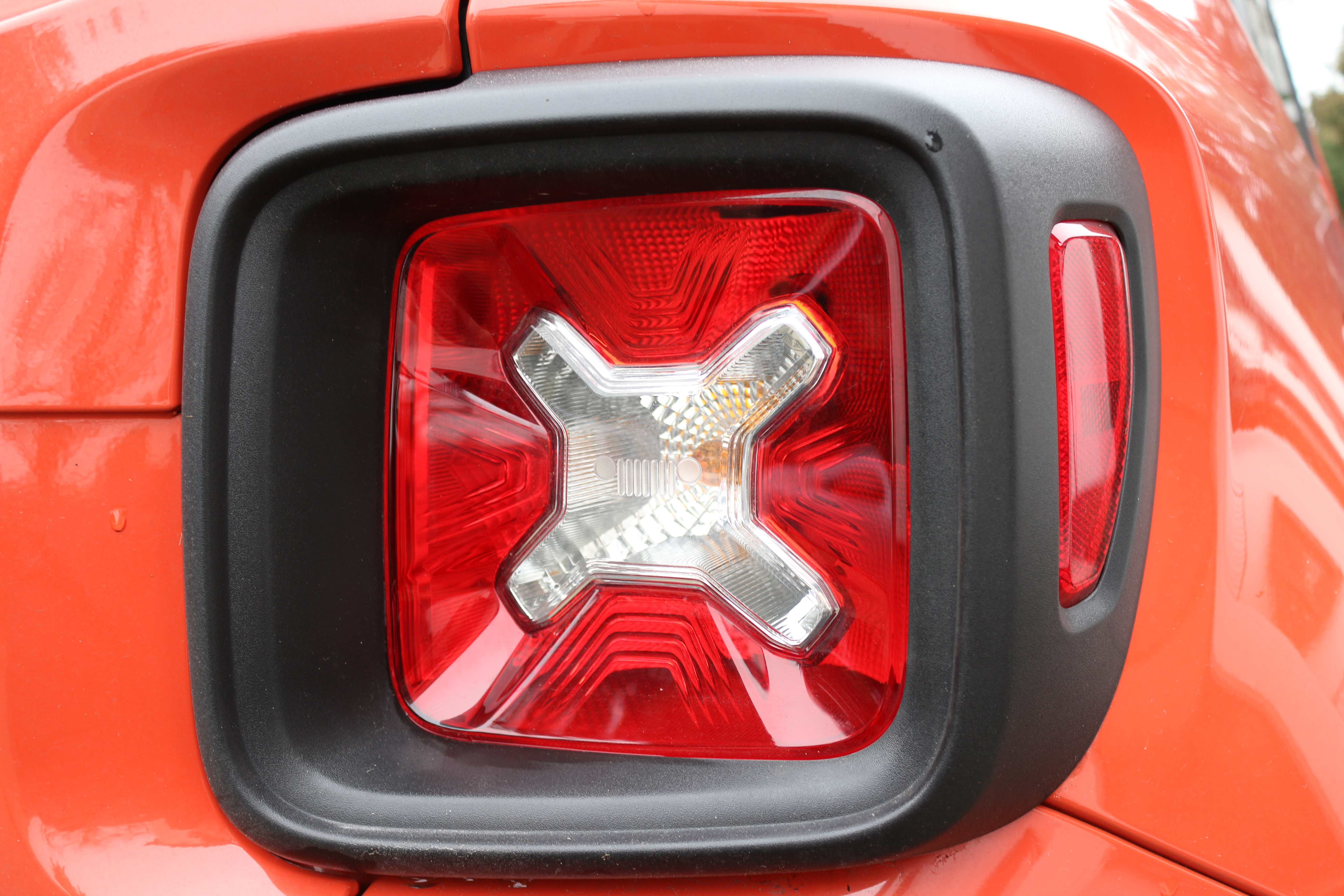 Heckleuchte des Jeep Renegade mit Designanlehnung an einen Benzinkanister.